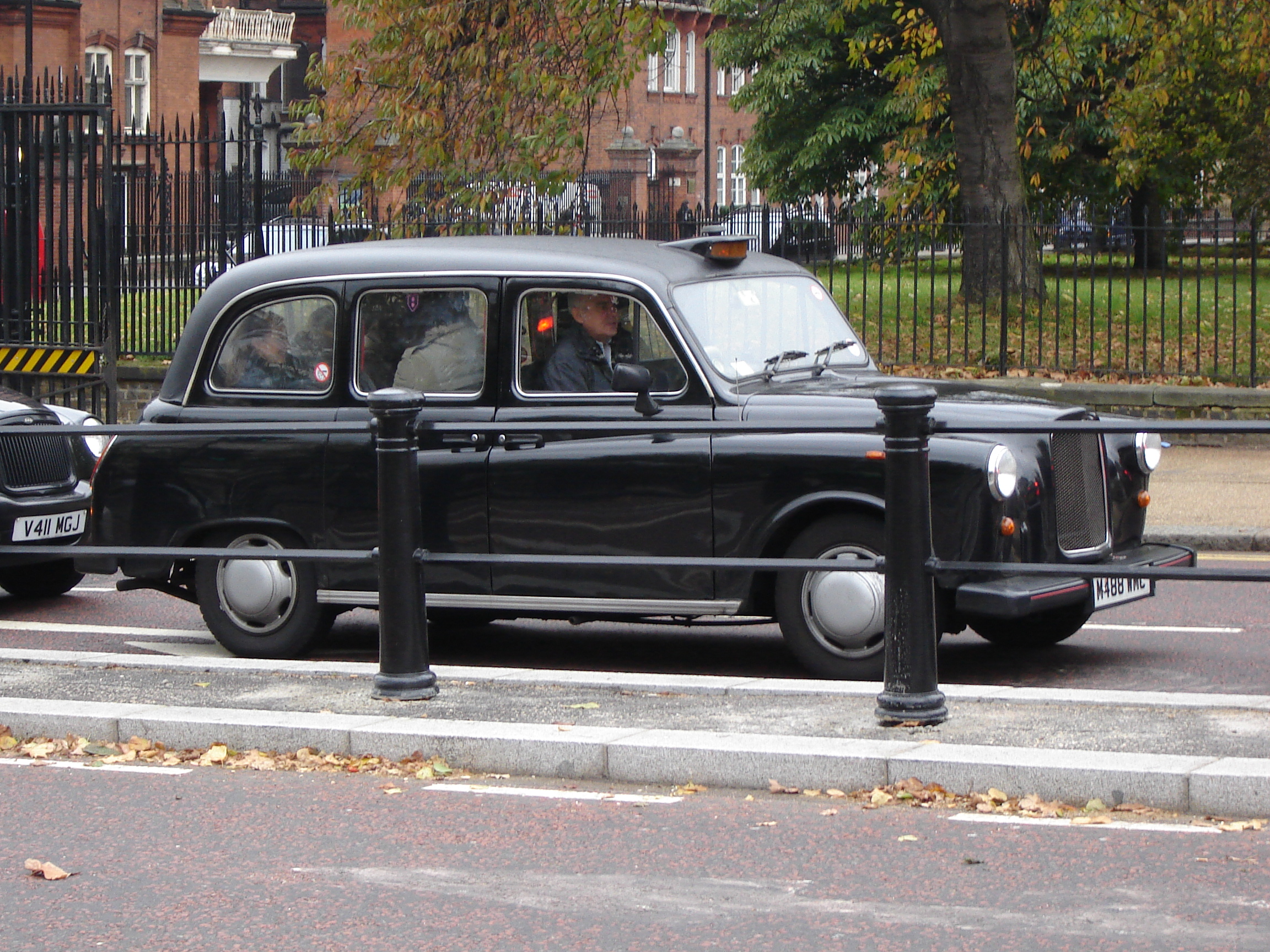 Taxi u Londonu.